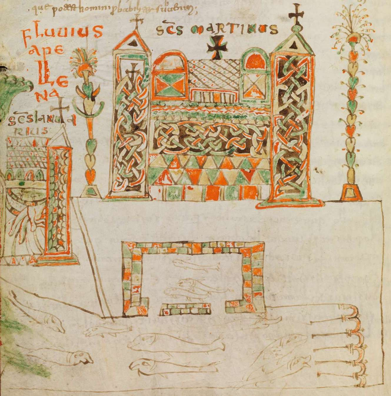 Mögliche Darstellung von Vivarium aus der Bamberger Handschrift von Cassiodors Institutiones